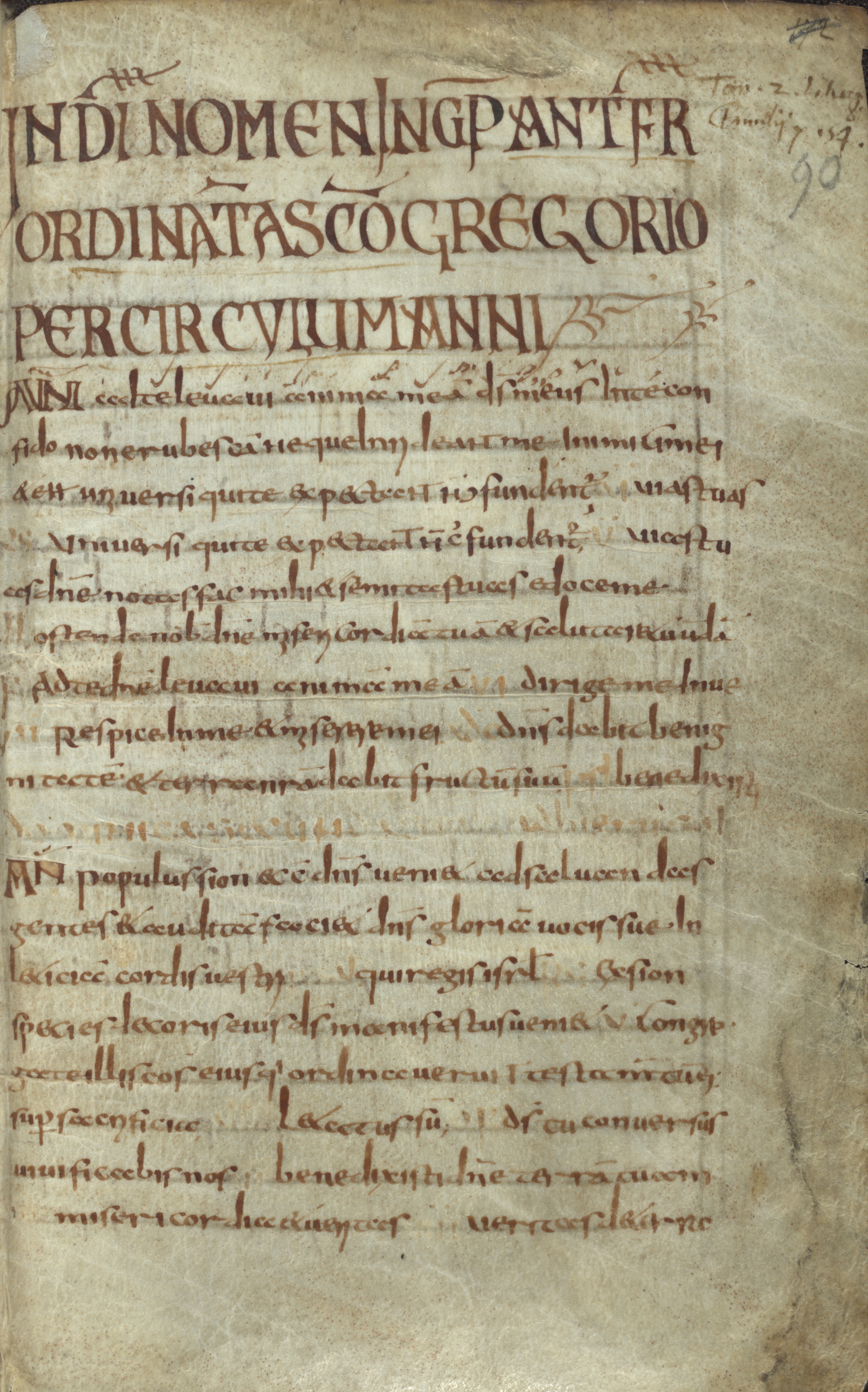 Erste Seite des Graduale von Mont-Blandin aus dem Codex Blandiniensis.